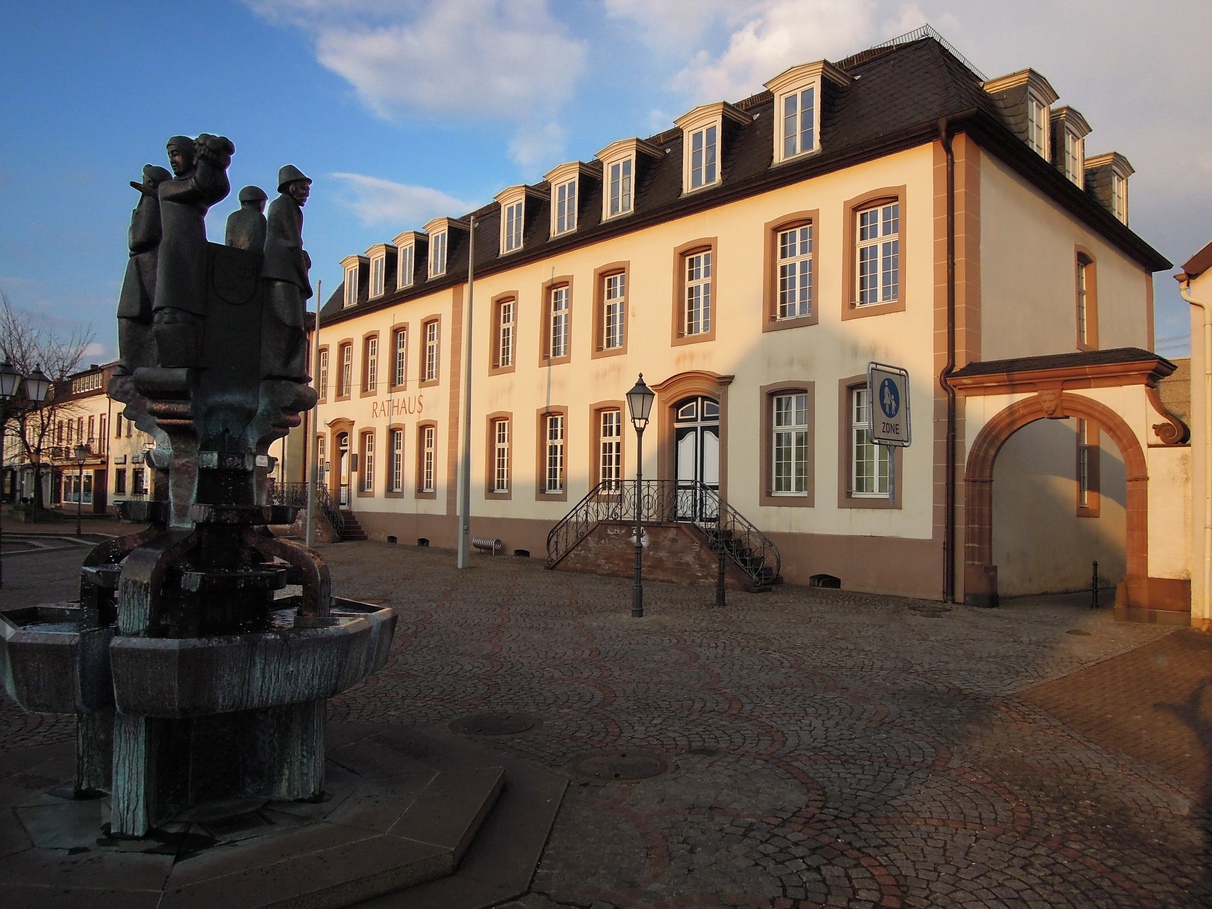 Schlossplatz, Schloss Saarwellingen, 1766 (Einzeldenkmal)